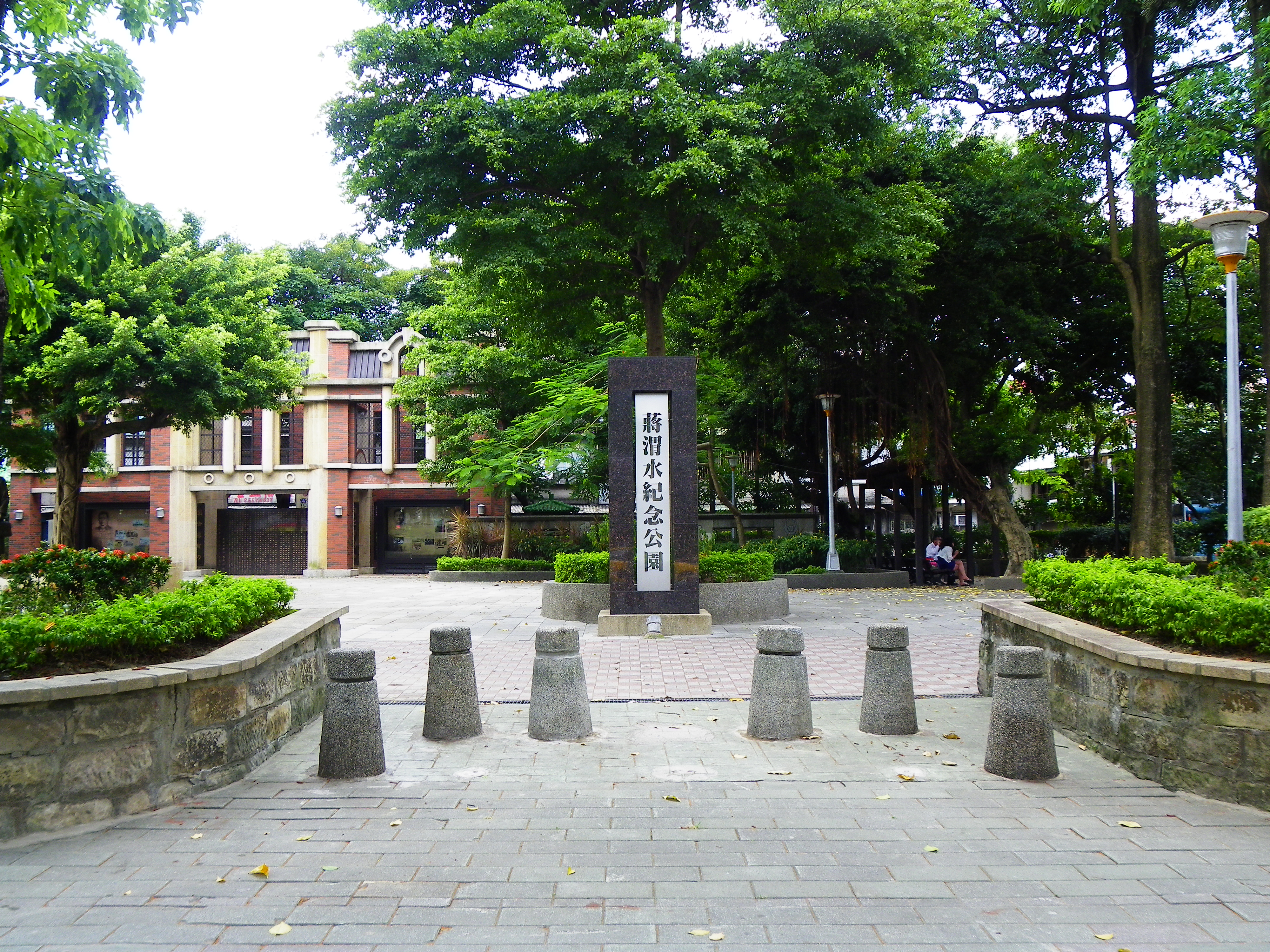 蔣渭水紀念公園西側入口前。